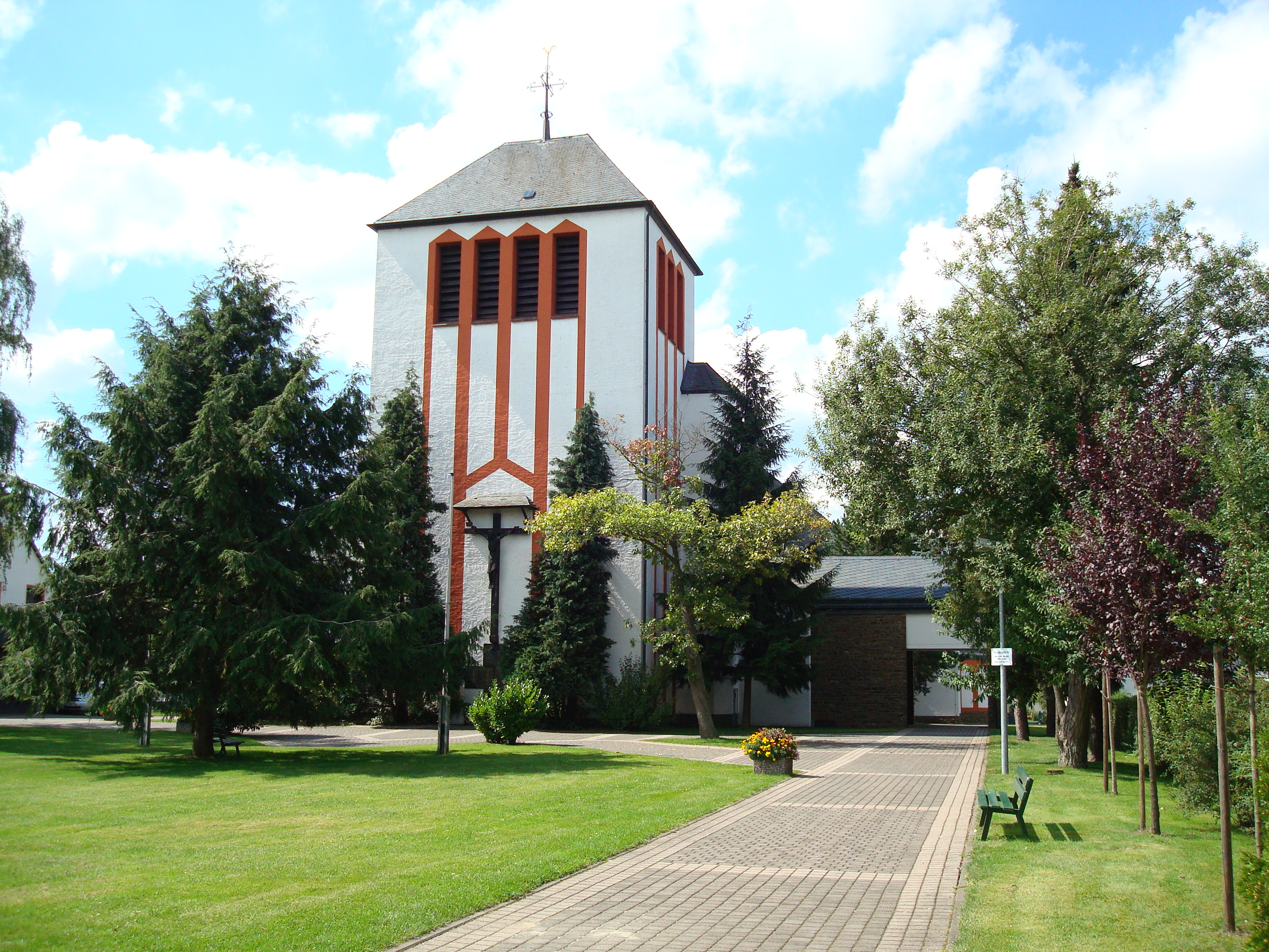 St. Hildegard in der Gemeinde Emmelshausen, Ansicht von Osten